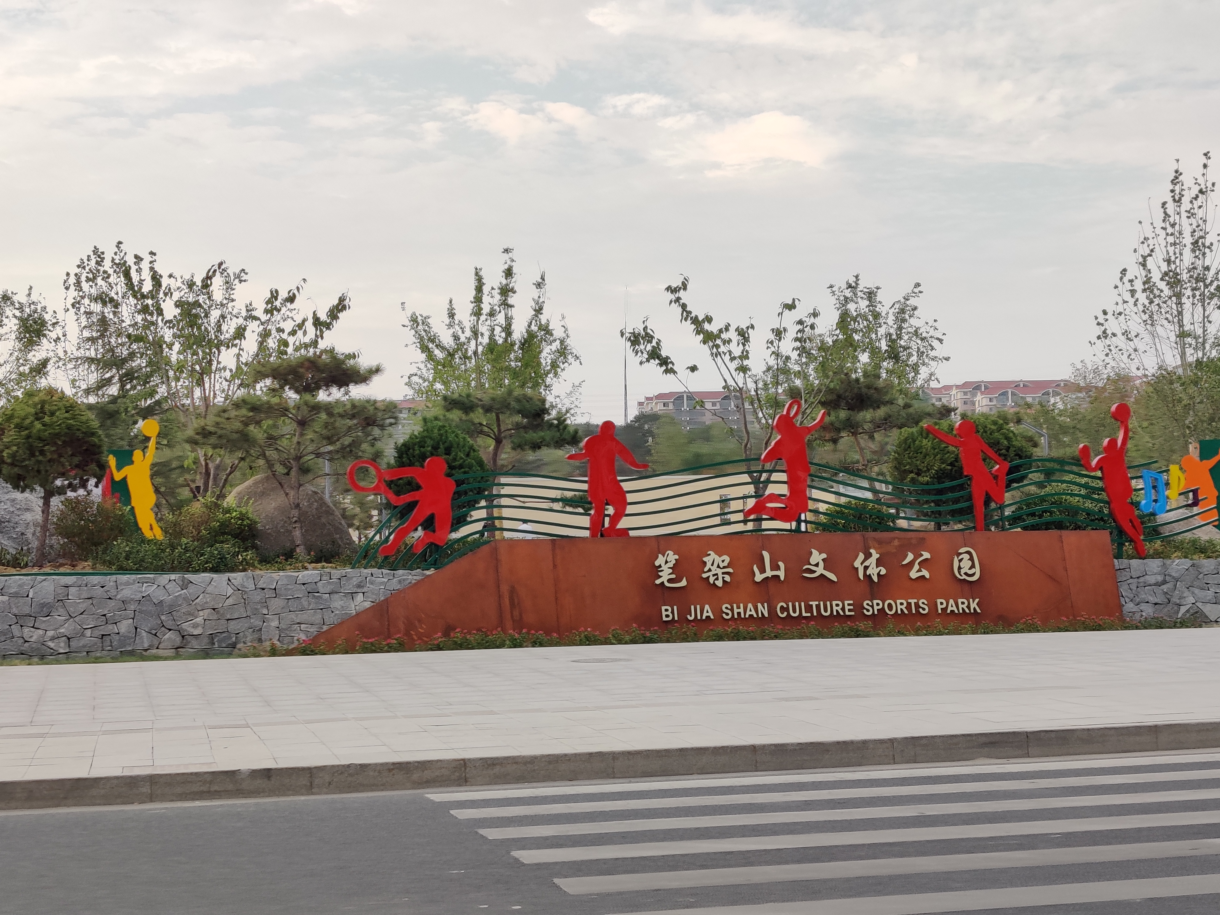 中文（中国大陆）: 笔架山文体公园大门